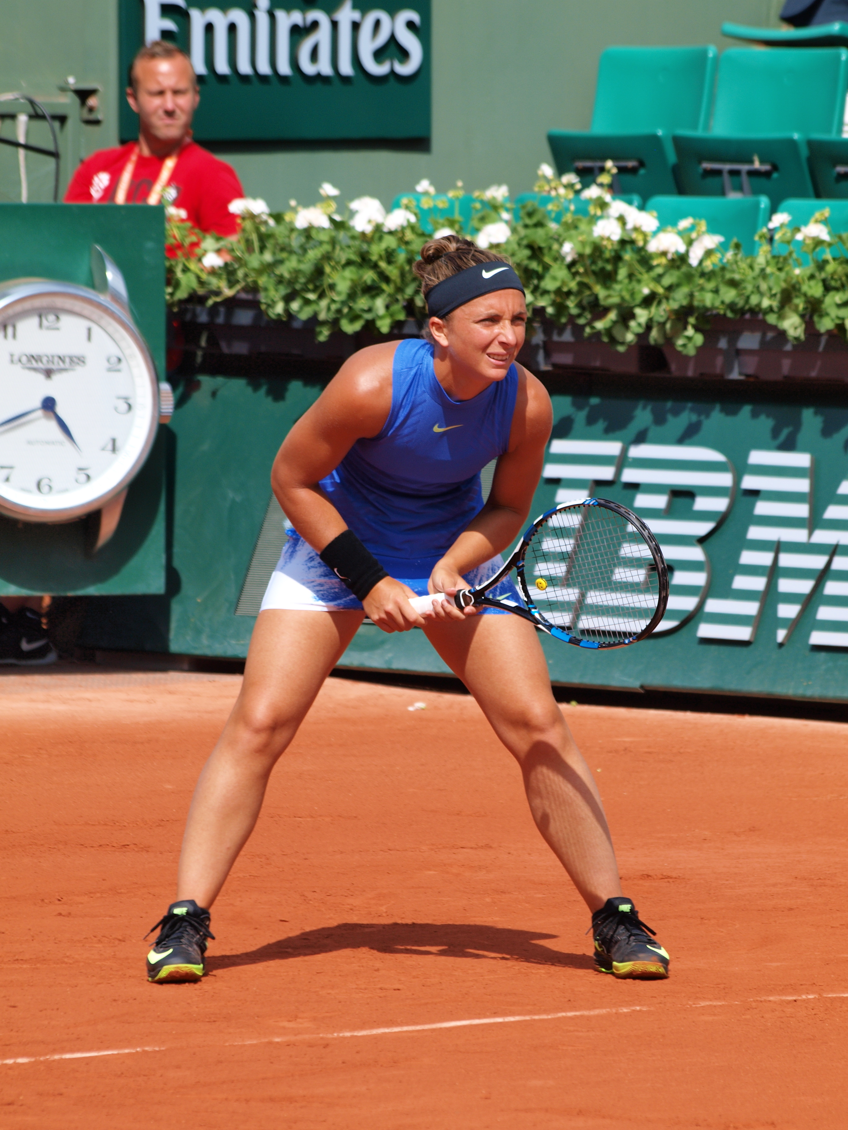 Sara Errani aux Internationaux de tennis de Roland Garros, le 31 mai 2017, dans son match contre Kristina Mladenovic.